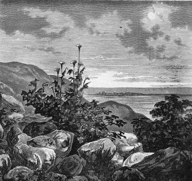 Vederea Muntelui Istrița - din Studiul Tesaurul de la Petrosa (1889) a lui Alexandru Odobescu